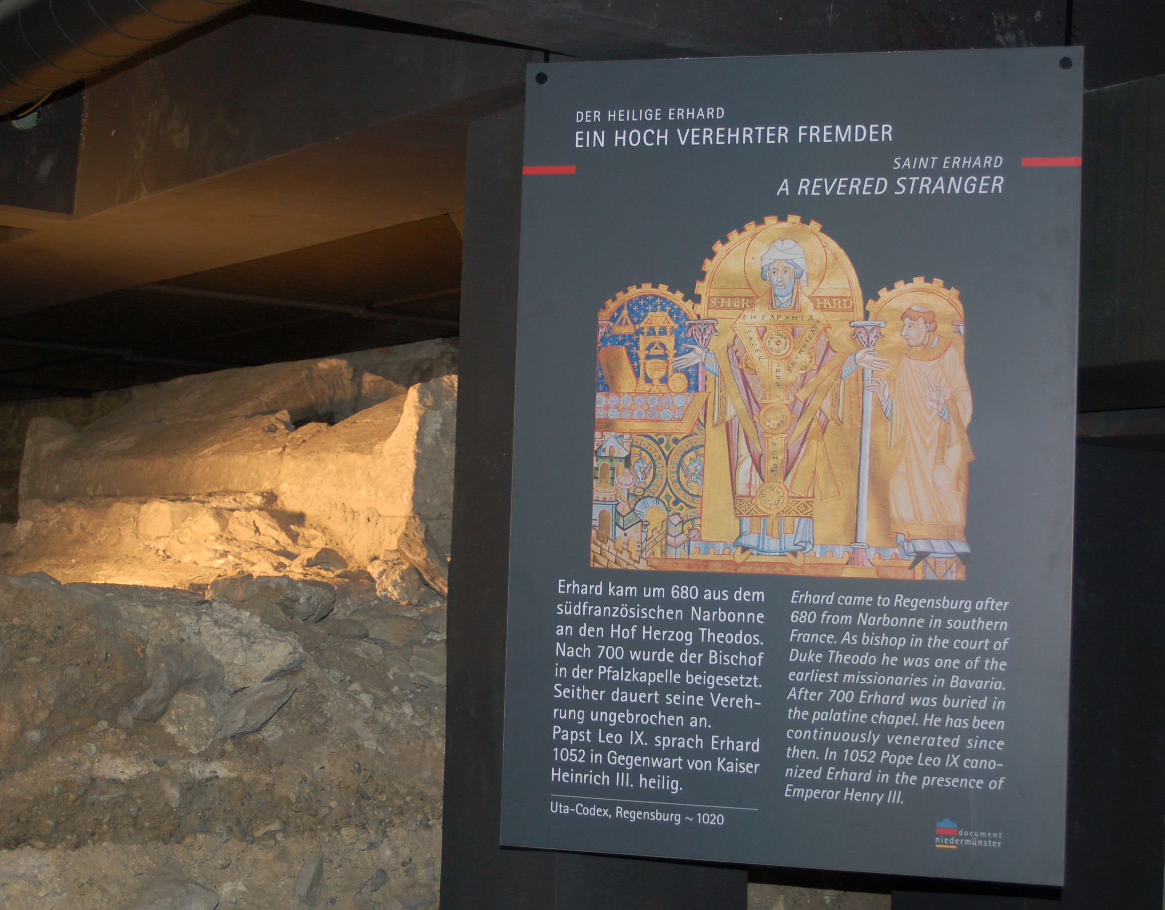 Informationsträger zum Erhardsgrab (Sarkophagdeckel im Hintergrund).